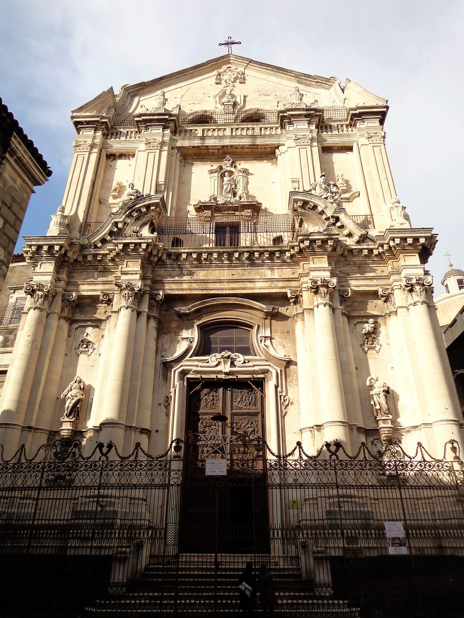 Prospetto